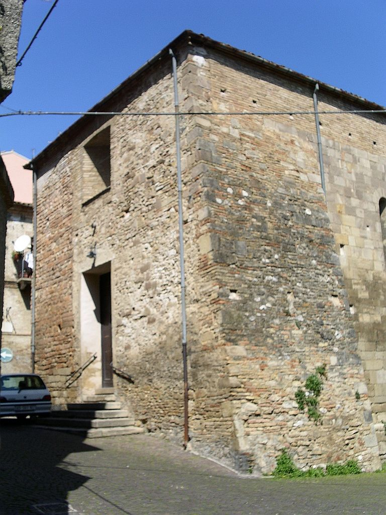 Chiesa di San Biagio, dettaglio del frontale. Foto scattata da me. Lanciano (CH), 7 aprile 2007